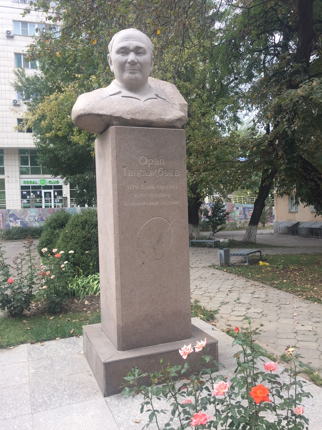 Памятник Оралу Тансыкбаеву в Алматы